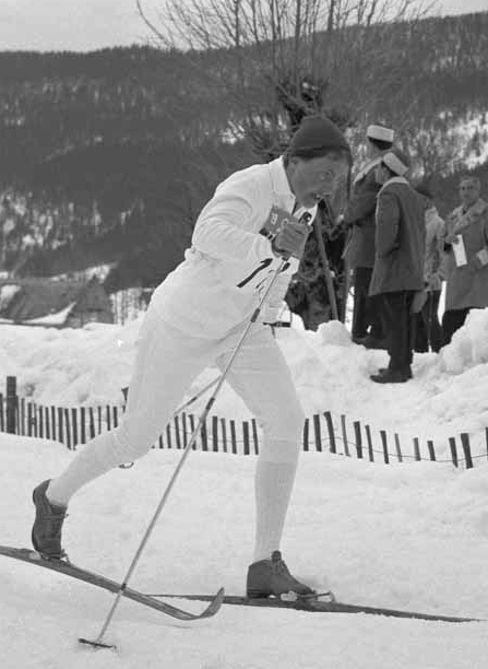 Britt Strandberg